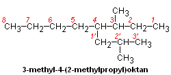 K výkladu nomenklatury alkanů: 3-methyl-4-(2-methylpropyl)-octane Autor: Antonín Vítek, e-mail: avitek(at)lib(dot)cas(dot)cz